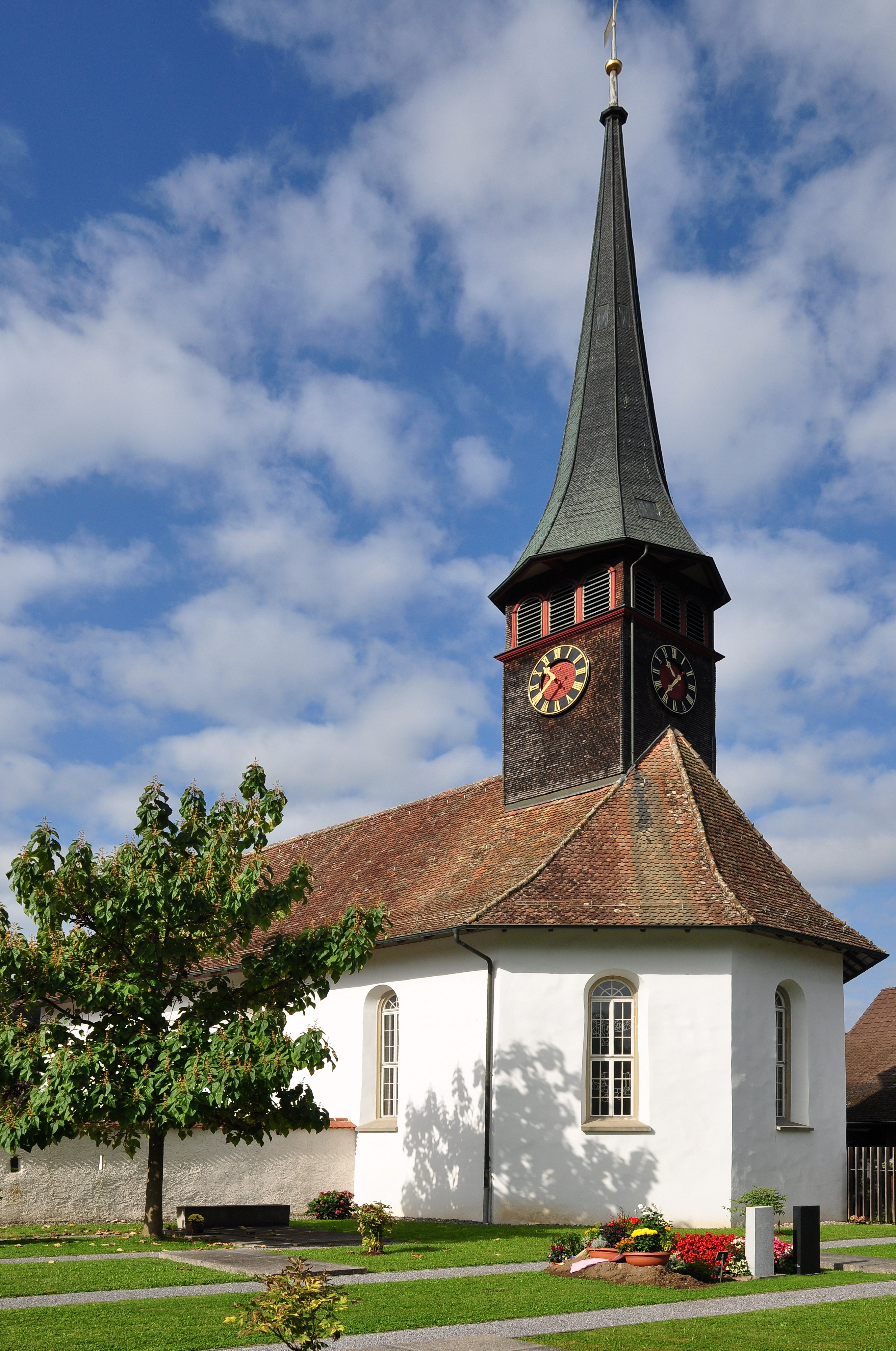 Kirchenbezirk, Büelstrasse 17 in Weiach (Switzerland)